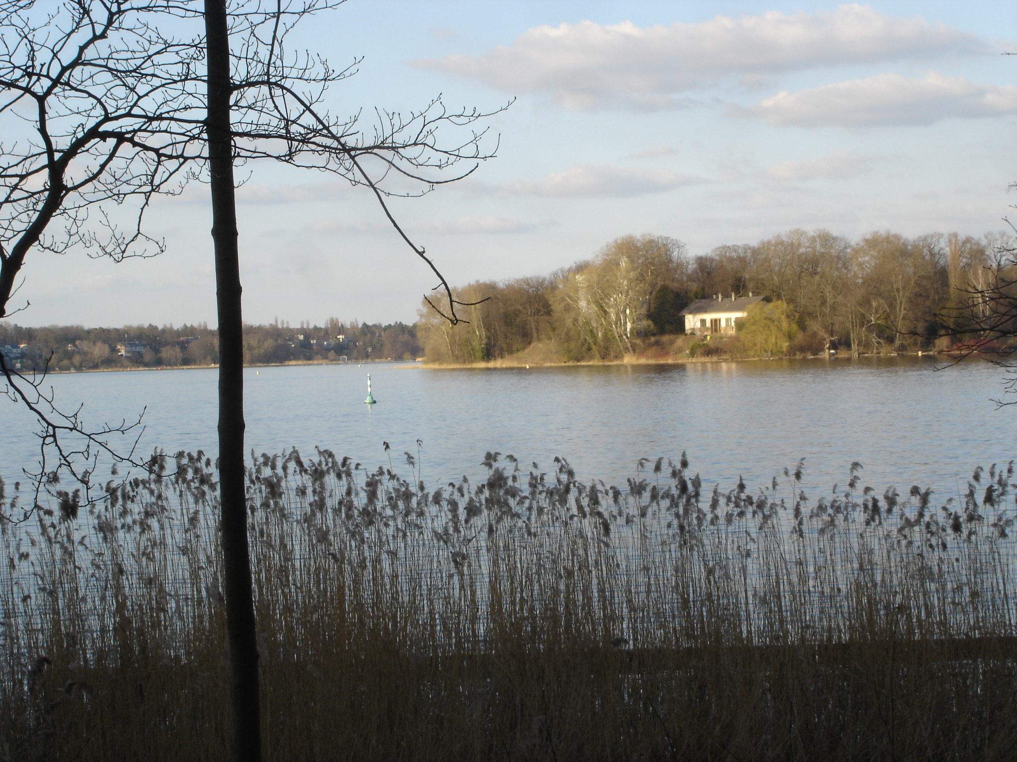 Blick auf die Pfaueninsel von Nikolskoe